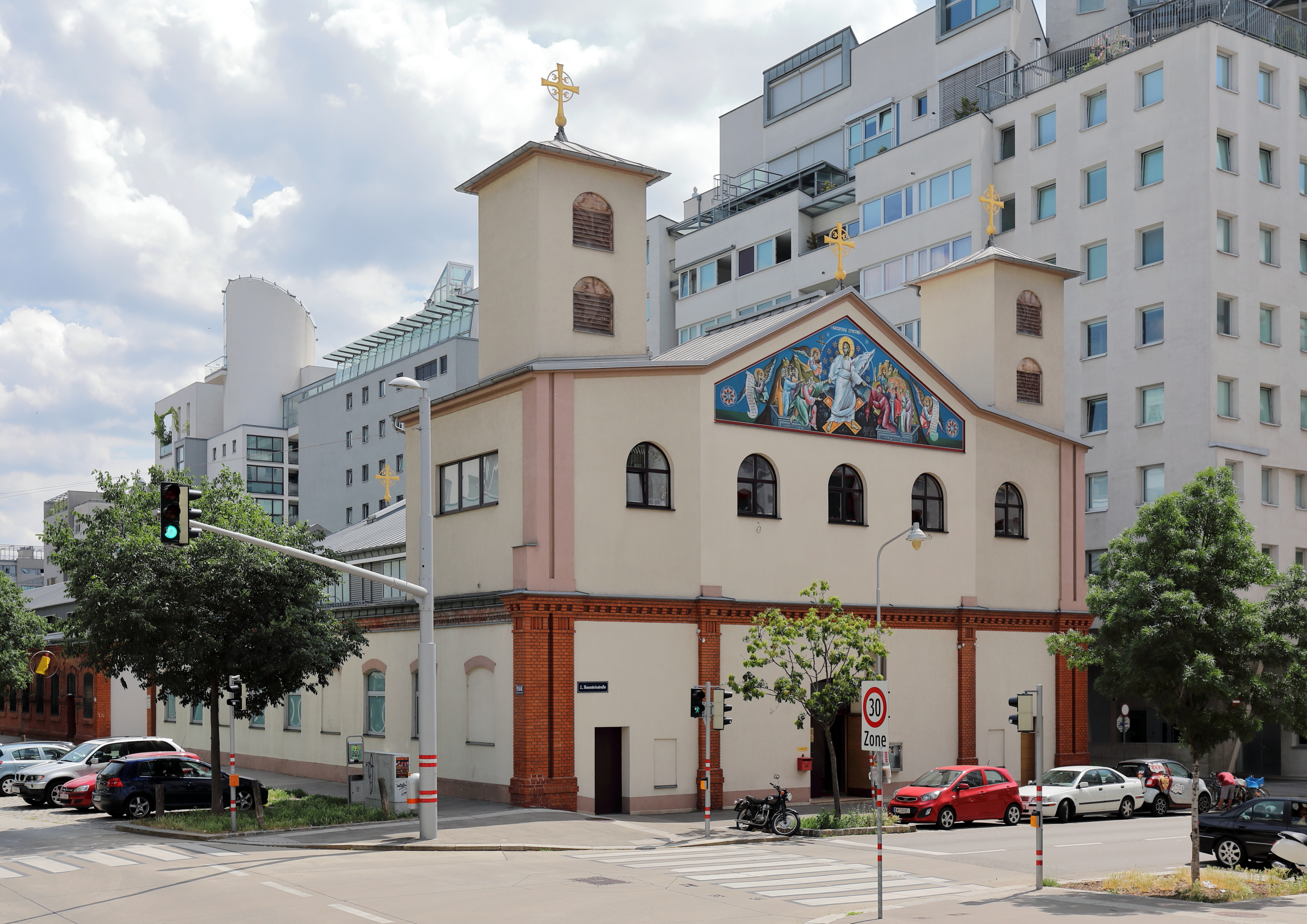 Nordansicht der serbisch-orthodoxen Auferstehungskirche an der Adresse Engerthstraße 158 im 2. Wiener Gemeindebezirk Leopoldstadt. Die Auferstehungskirche wurde in einer aufgelassenen Straßenbahngarage errichtet und am 26. Oktober 2002 geweiht. Ab 2006 fand ein Umbau statt, der mit der Neueinweihung der Kirche am 30. September 2007 abgeschlossen wurde. Bei dem Umbau wurden unter anderem die zwei Kirchtürme errichtet.